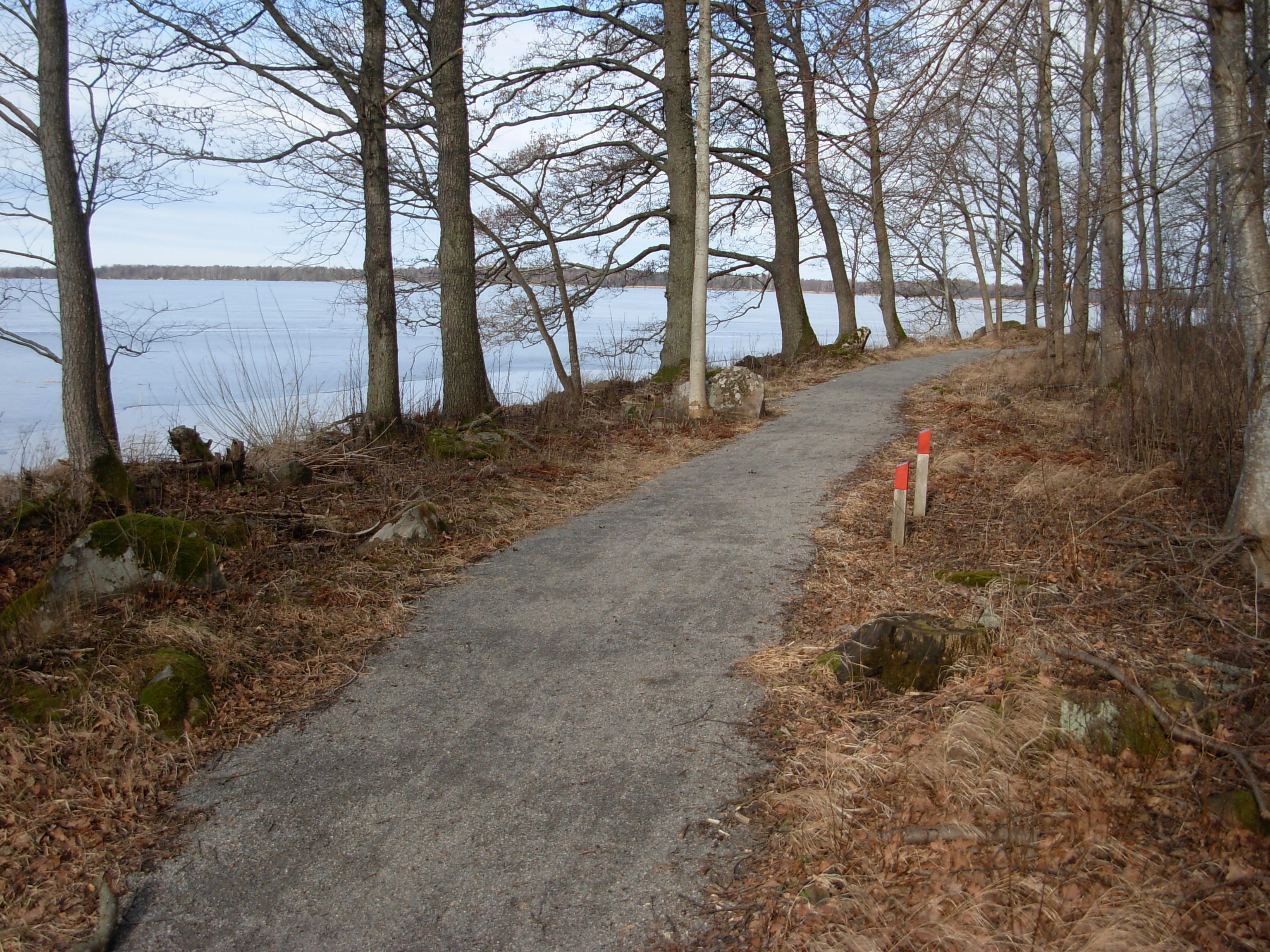 Ekeby dreve är ett naturreservat vid Hjälmaren nära Ekeby-Almby.